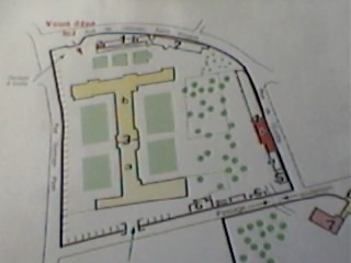 Plan de l'Abbaye St Vincent du Mans, Internat du Lycée Bellevue.